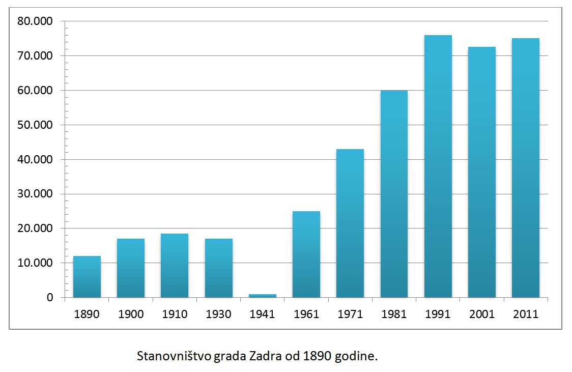 Stanovništvo grada zadra graf